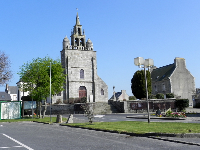 Tredarzeg. Iliz. Kuzh-heol